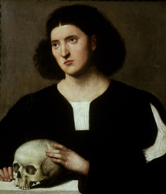 Retrato de joven con calavera, Ashmolean Museum